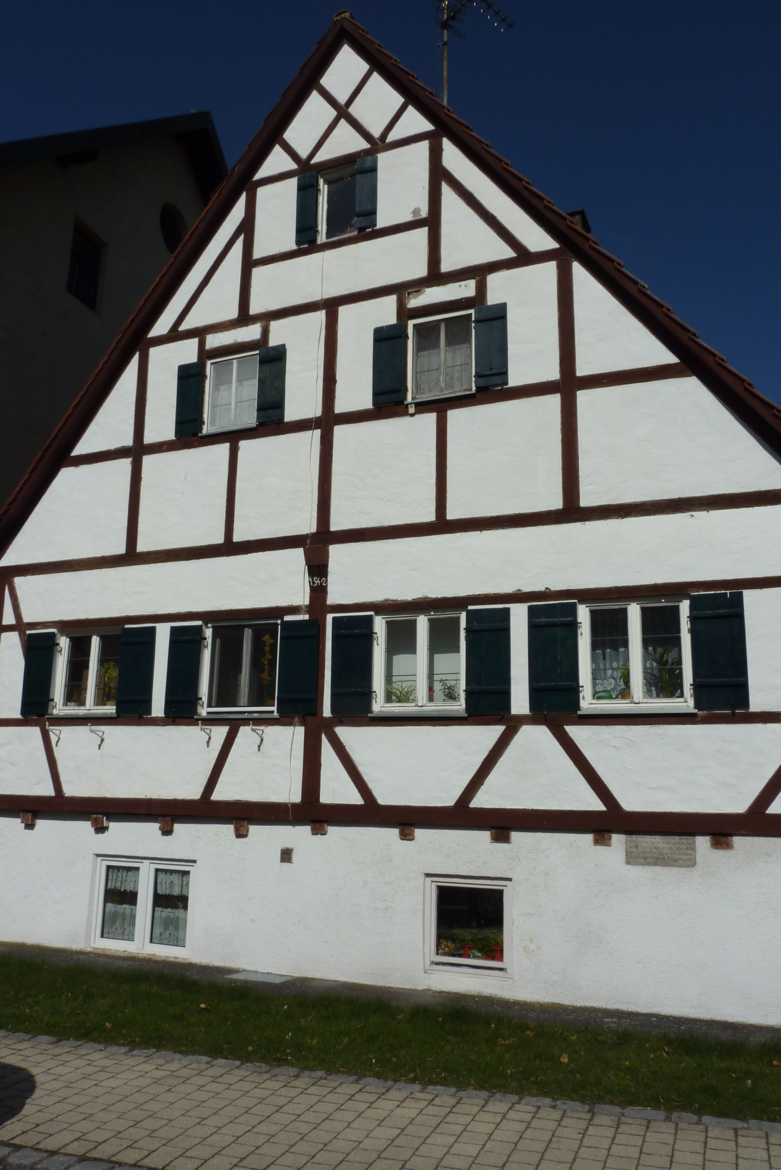 Ehemalige Synagoge in Mönchsdeggingen, Südfassade